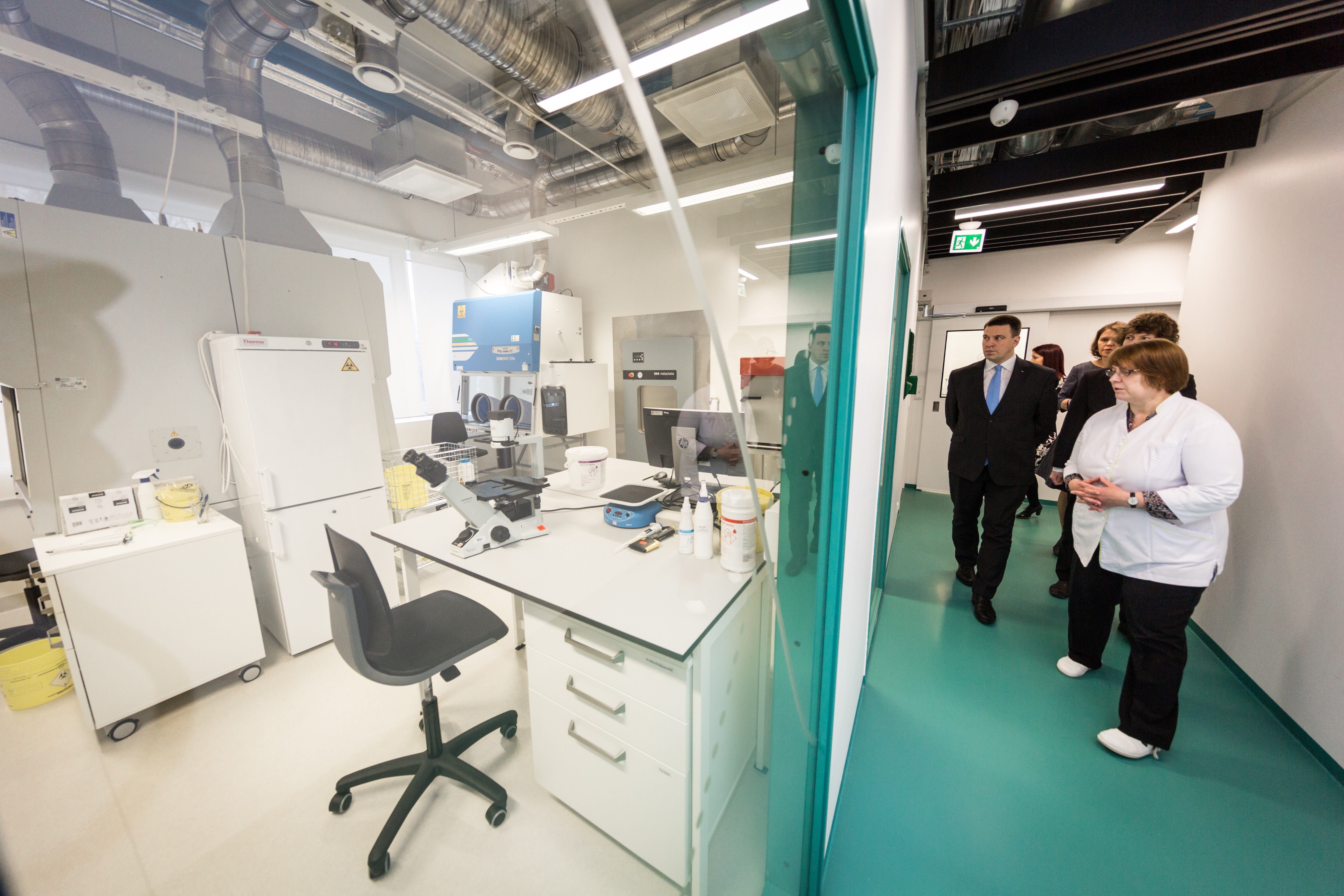 Terviseameti külastus 7. märtsil 2020